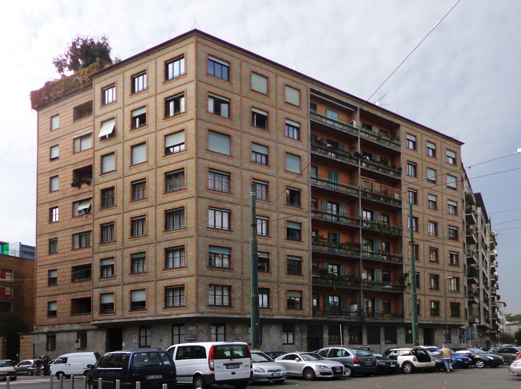 Milano, edificio residenziale (cosiddetta “Casa dei giornalisti”) in viale Monte Santo 7 angolo via Appiani, costruito dal 1934 al 1936 su progetto di Giovanni Muzio.Fonte: Maurizio Grandi e Attilio Pracchi, Milano. Guida all'architettura moderna, Bologna, Zanichelli [1980], 1998, p. 226. ISBN 88-08-05210-9.